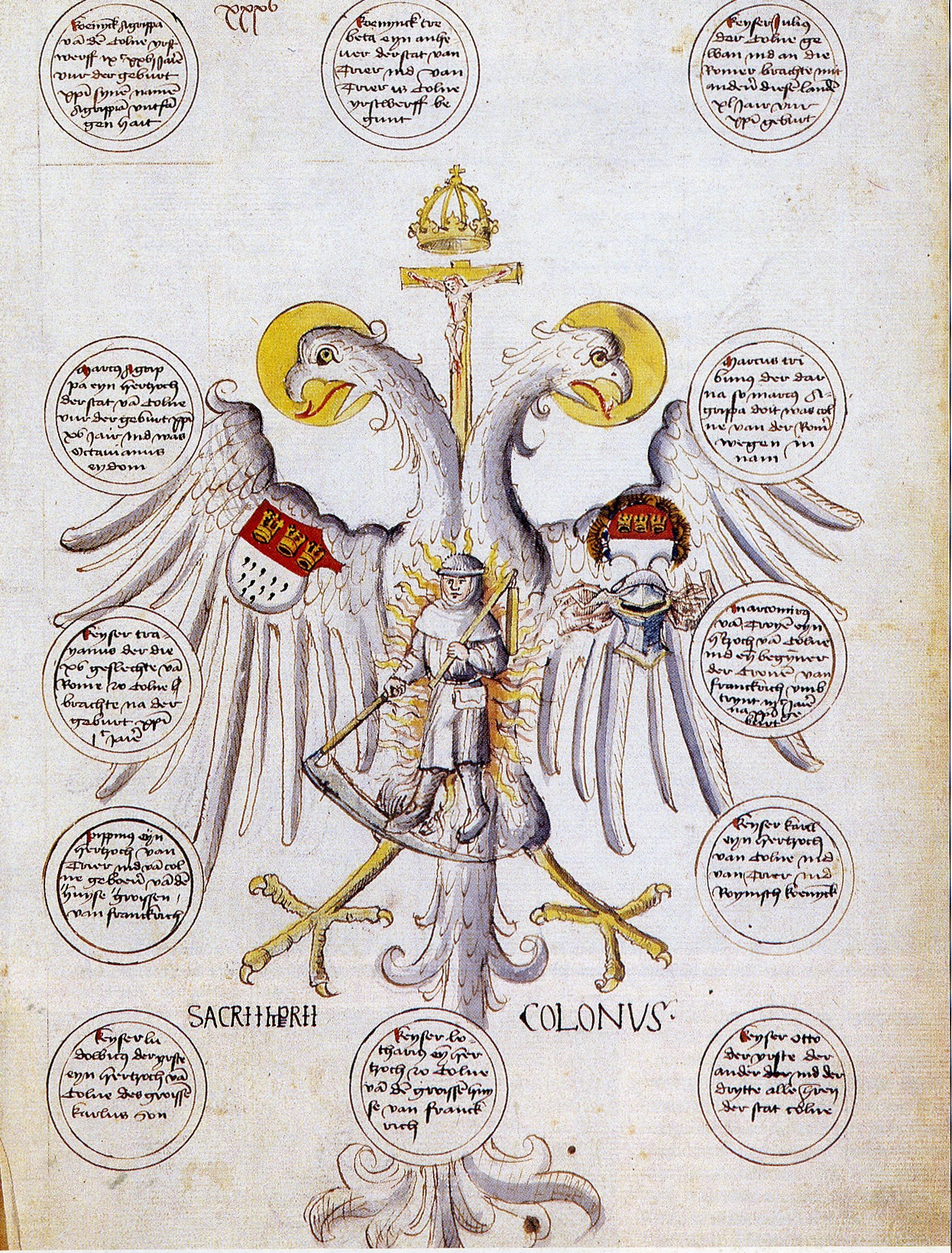 Köln, Wappen der Reichsstadt Köln